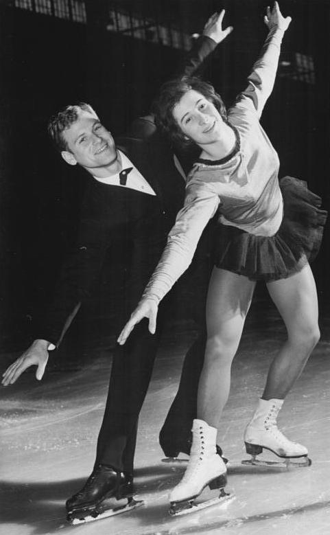 Margit Senf, Peter Goebel Zentralbild Kohls-Studrè 11.12.1963 Olympia-Ausscheidungen im Eiskunstlauf stehen bevor. Um die noch zu vergebenden Plätze für die gemeinsame deutsche Olympiamannschaft geht es bei den Olympia-Ausscheidungen zwischen den Eiskunstläufern der DDR und Westdeutschland, die am 12.12.1963 in der Berliner Werner-Seelenbinder-Halle und am 19.12.1963 in Westberlin stattfinden. UBz: Margit Senf - Peter Goebel (TSC Berlin) sind für die Olympischen Winterspiele in Innsbruck bereits fest nominiert.